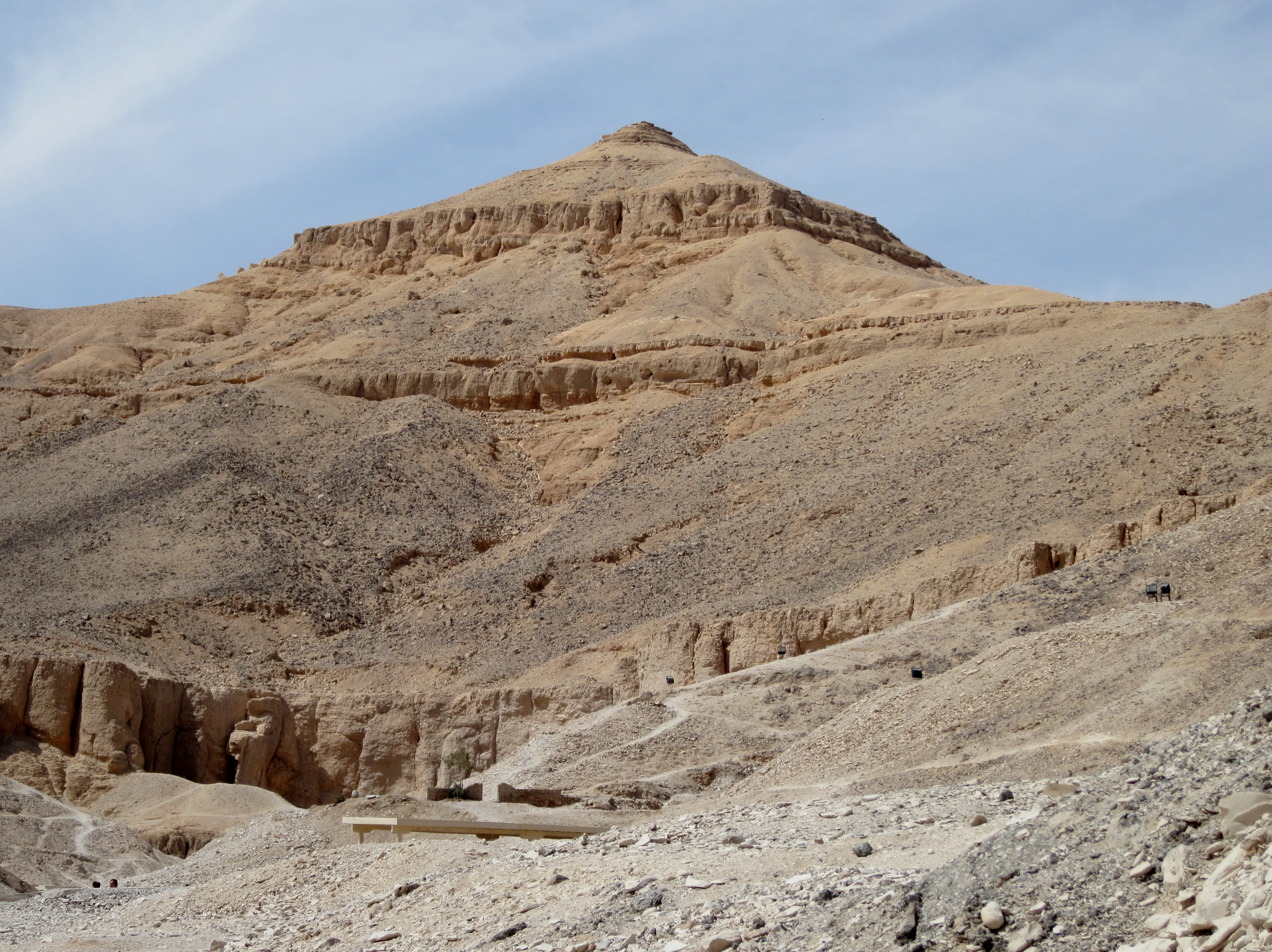 „Tal der Könige“, Theben-West (Luxor), Ägypten